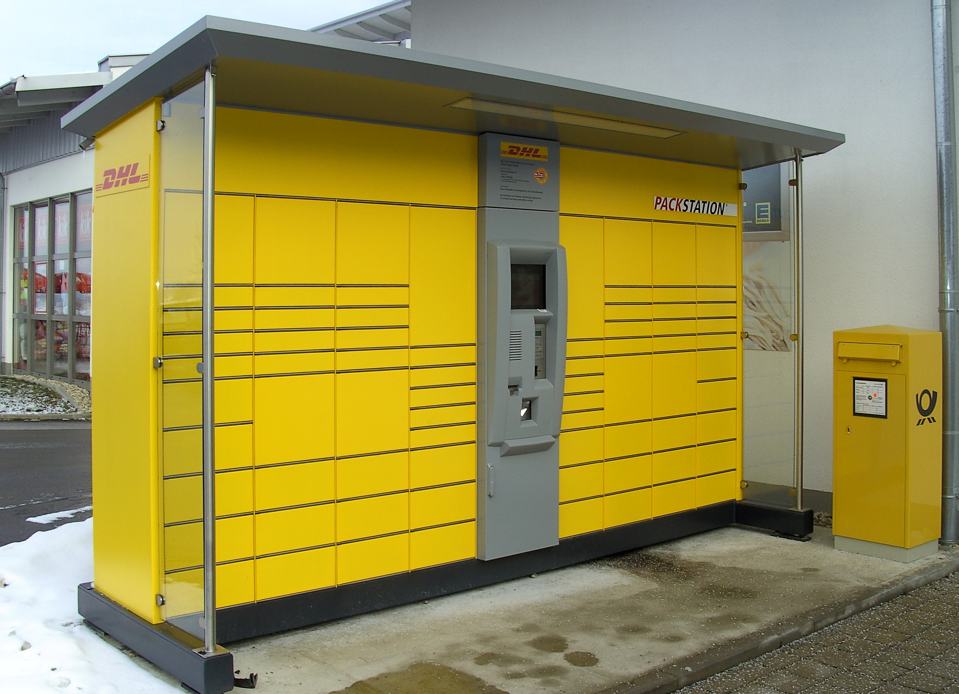 Packstation in Aldersbach, Bayern.